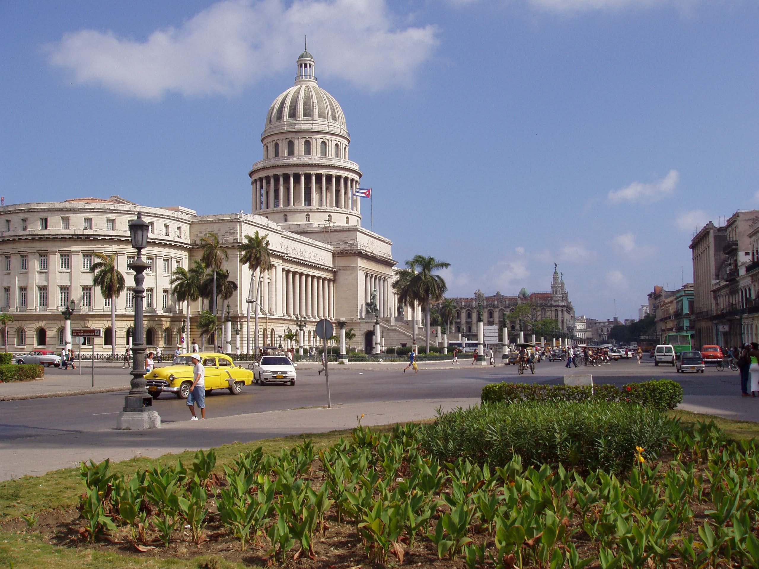 Capitol de La Havane